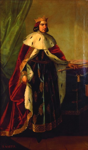 Retrato imaginario del rey Martín I de Aragón (1356-1410), que fue hijo del rey Pedro IV de Aragón y hermano del rey Juan I, a quien sucedió en el trono.